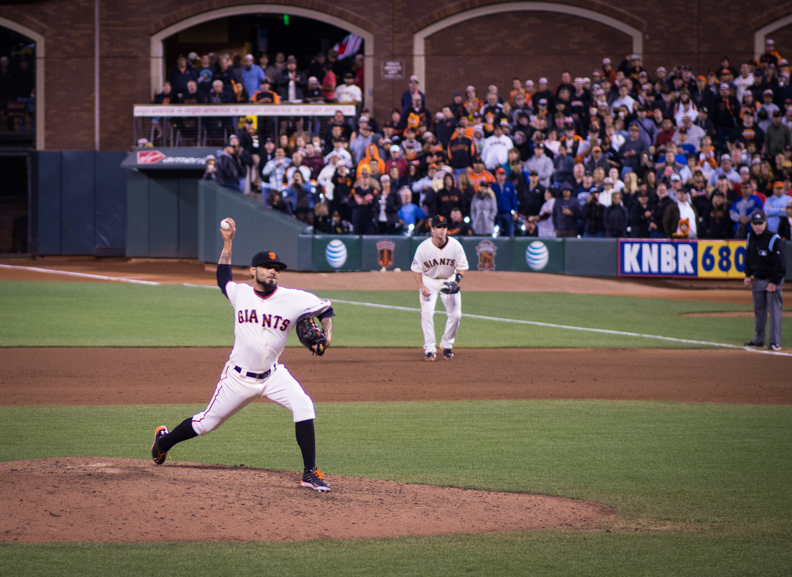 Romo